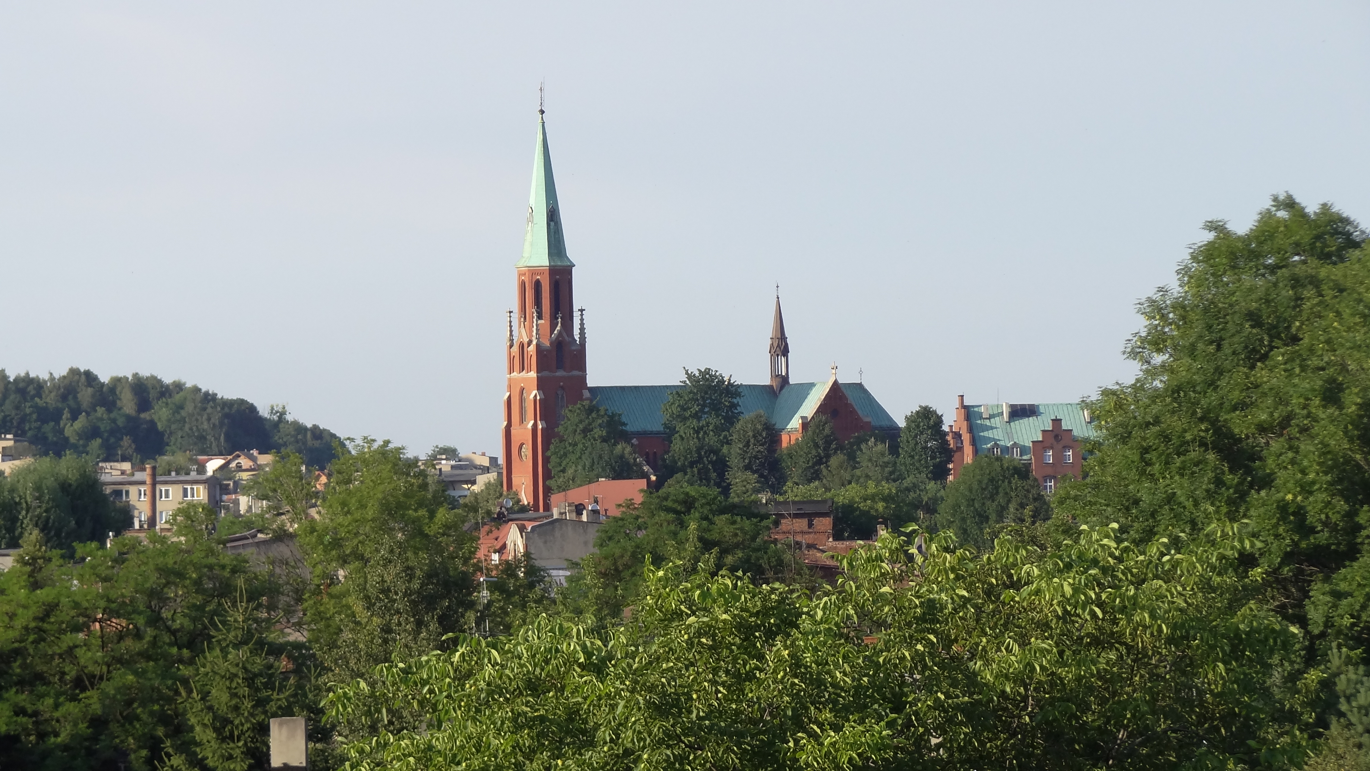 Ciekawa Kraina.